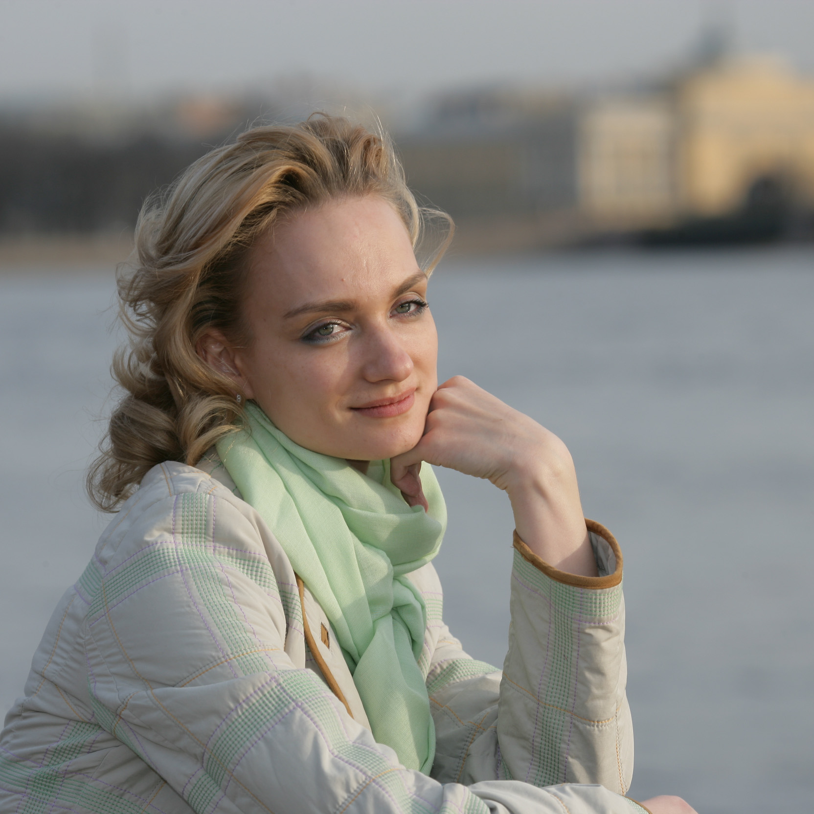 Колесникова, Ирина Владимировна